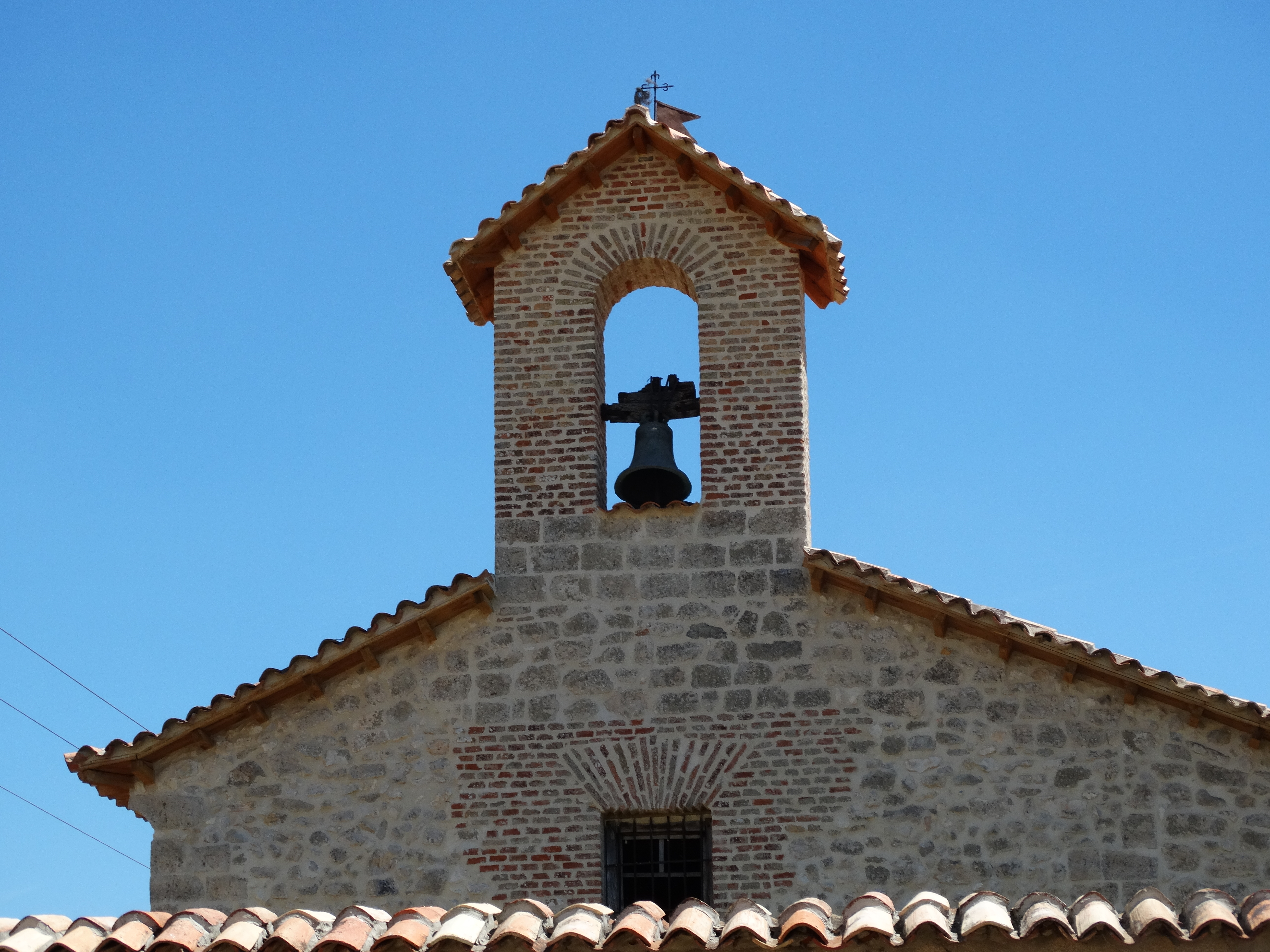 Valladolid, España. Despoblado de Fuentes de Duero. Espadaña de la iglesia románica dedicada a Santiago. Está restaurada.